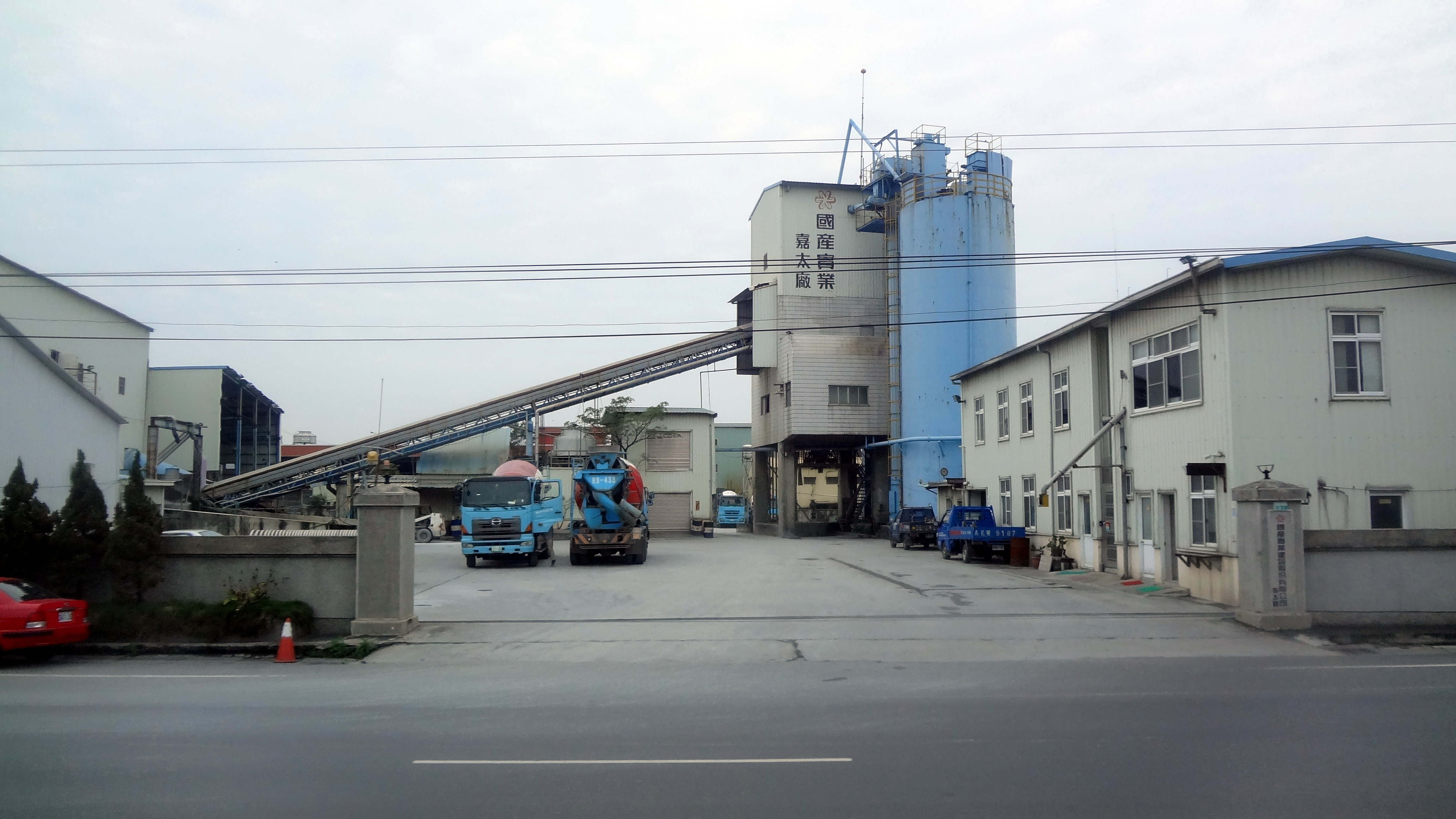 國產實業建設嘉太廠，地址：嘉義縣太保市北港路二段91號。本照片係於遊覽車上拍攝。